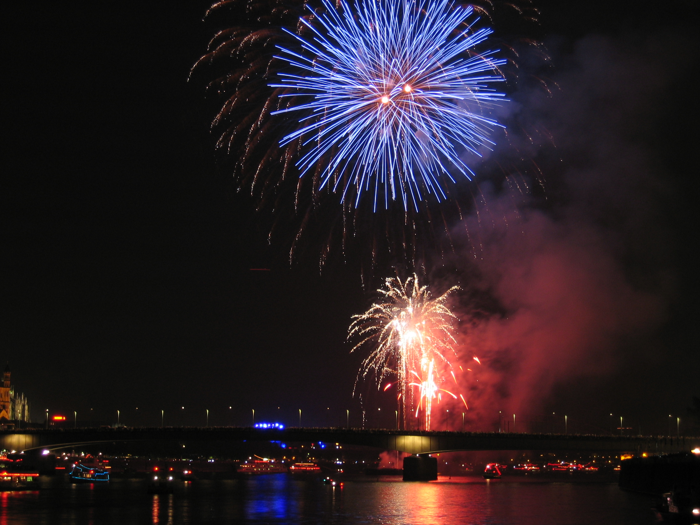 Cologne - Koelner Lichter 2006